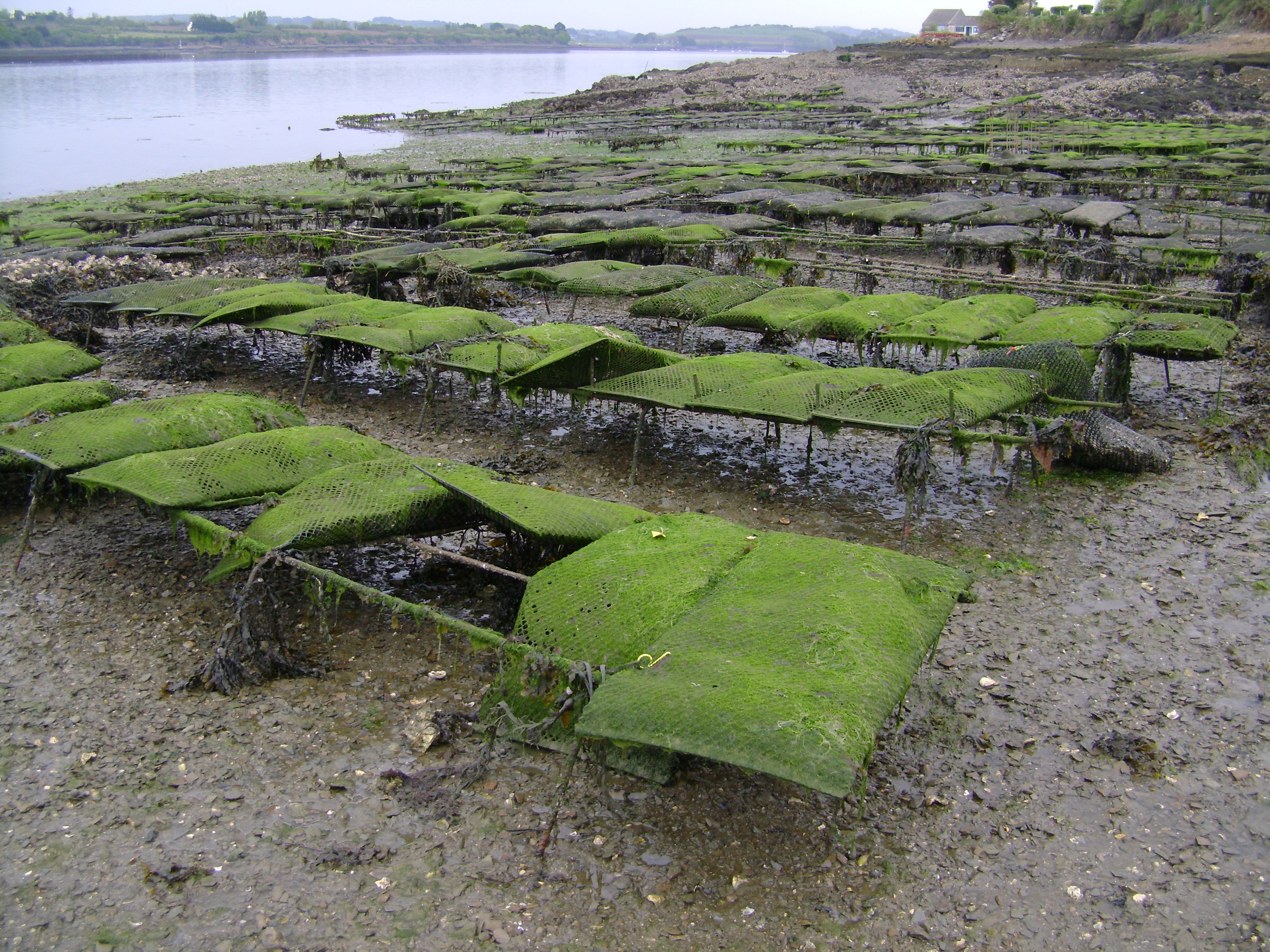 Logonna-Daoulas, élevage d'huîtres sur tables à la pointe du Château.JPG